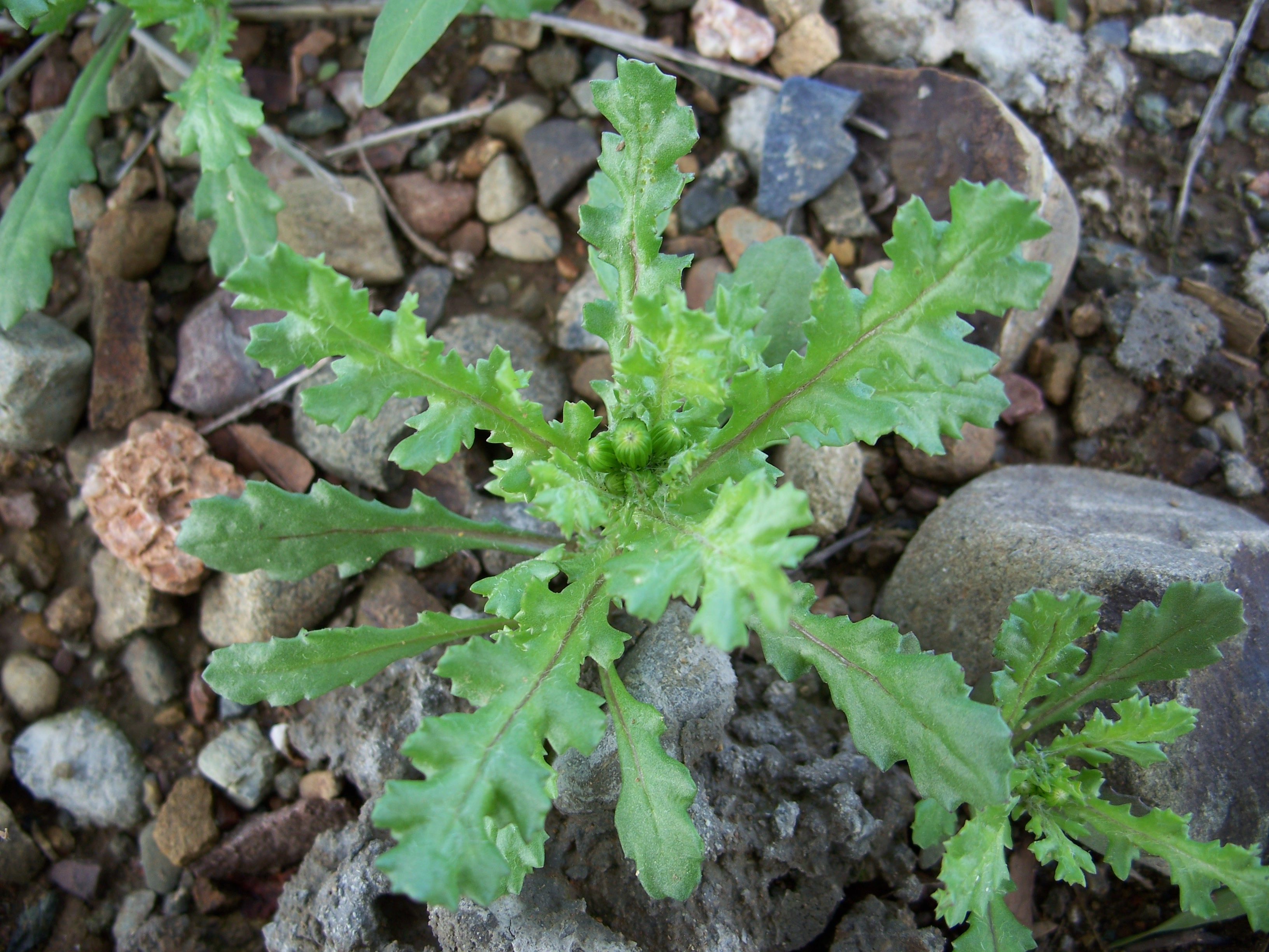 Senecio vulgaris Made in San Jose, California on February 11, 2007. Identified by Rasbak.